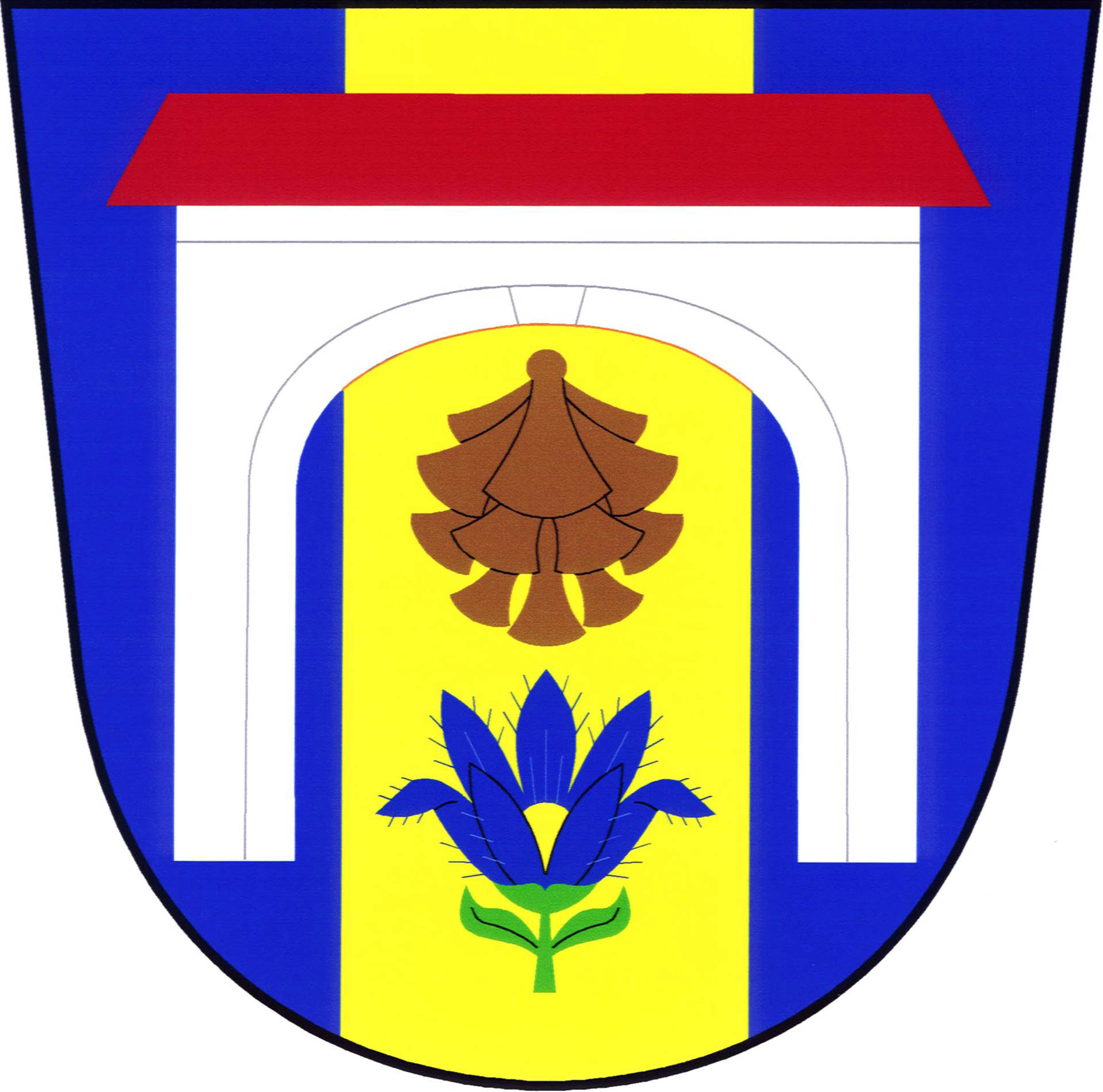 Znak obce Boreč